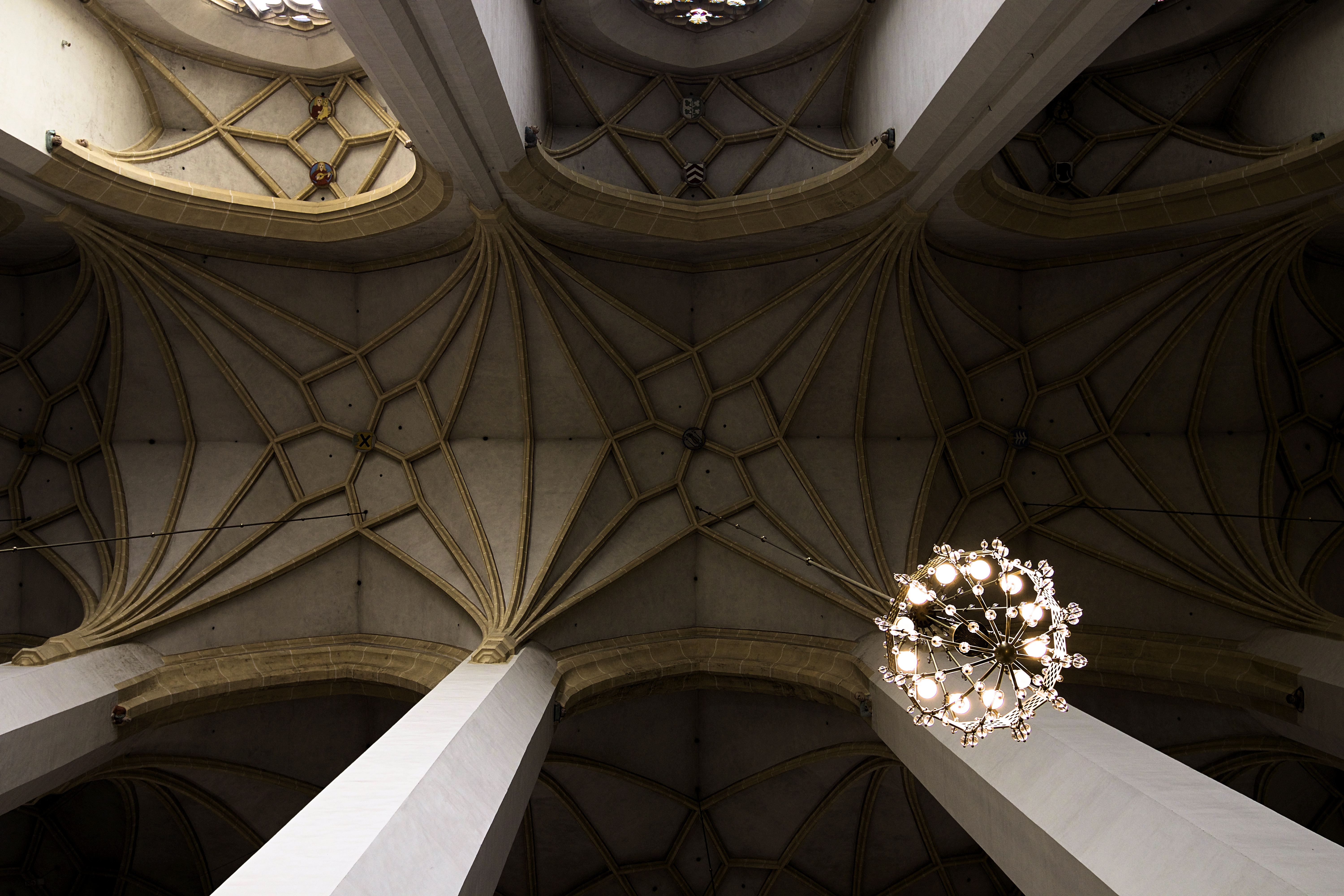 Deckenansicht, Frauenkirche in München